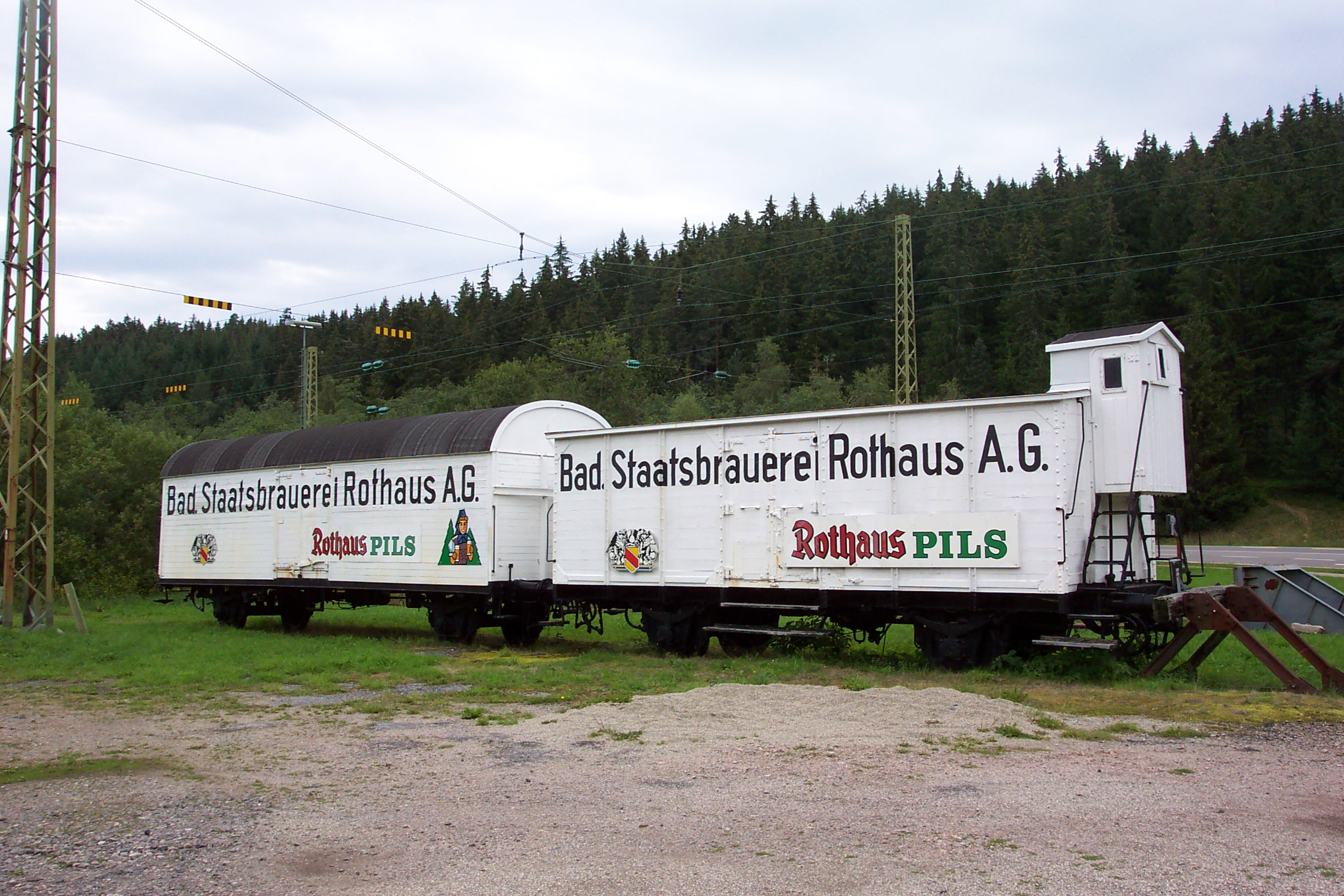 Zwei alte Güterwagen werden im Bahnhof Seebrugg von der Brauerei Rothaus als Werbeflächen genutzt.